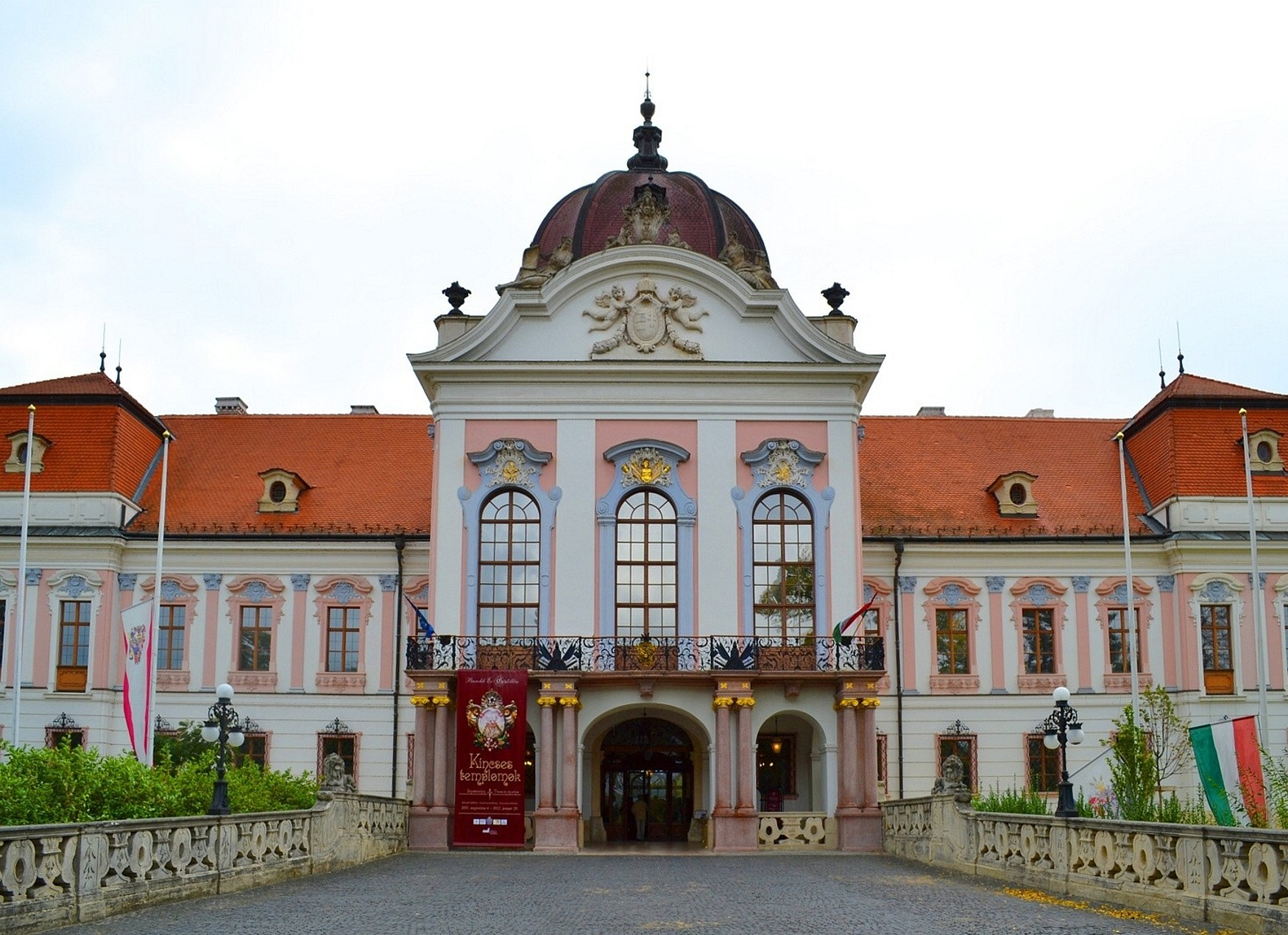 Schloss Gödöllő nordöstlich der ungarischen Hauptstadt Budapest in der Stadt Gödöllő